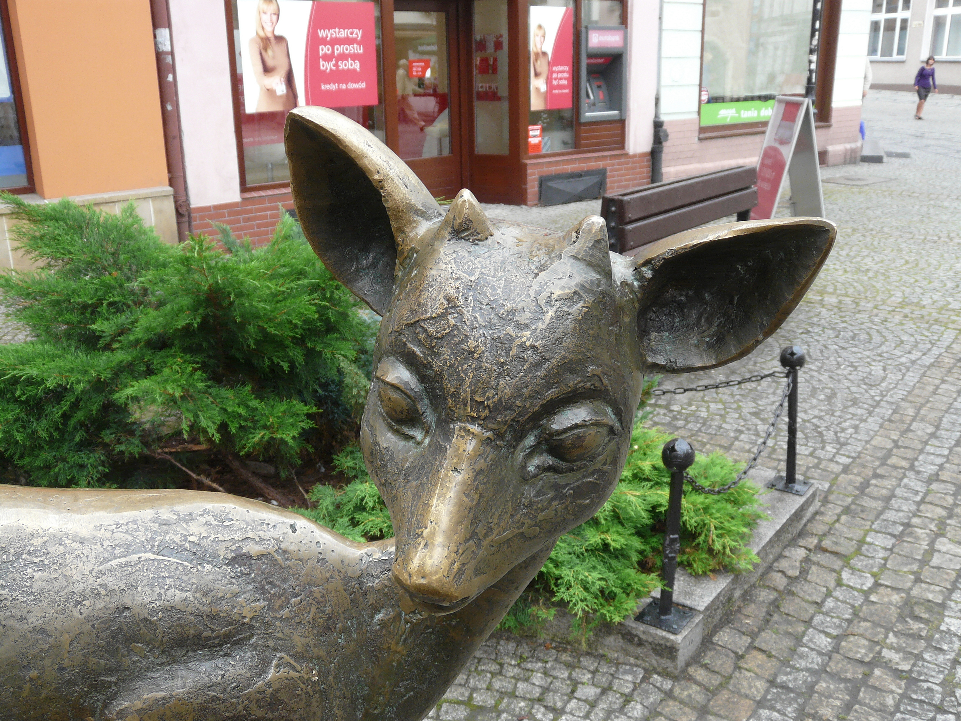 rzeźba jelonka w Jeleniej Górze